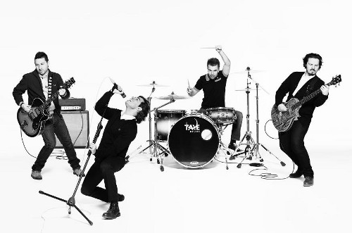 BLIND ZERO - 2013 - Kill Drama